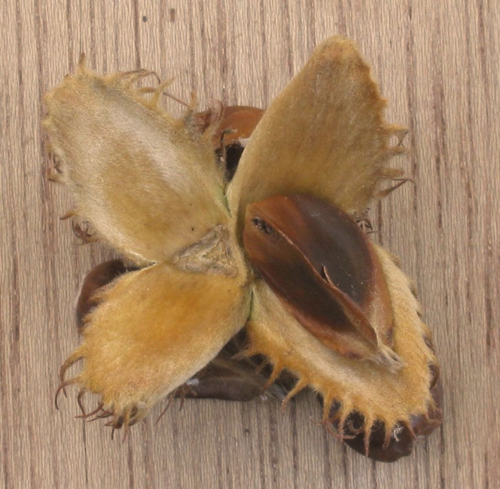 zelfgemaakte foto van beukenootjes met kelk; half september